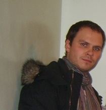 Aktorius Audrius Bružas